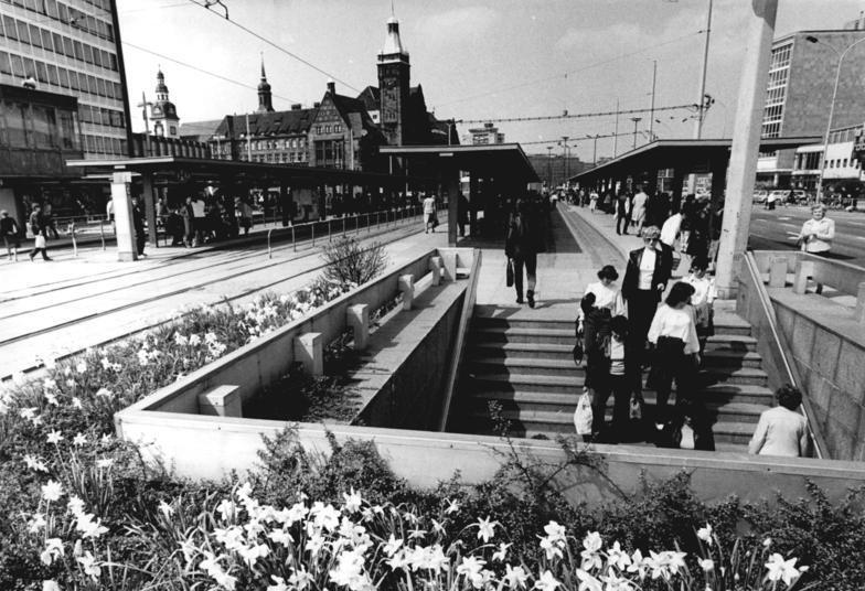 Chemnitz, Rathaus, Straßenbahnhaltestelle ADN-ZB Thieme 3.5.83 Karl-Marx-Stadt: Vor 30 Jahren wurde das traditionsreiche Arbeiterzentrum Chemnitz in Karl-Marx-Stadt umbenannt. Seit dieser Zeit entwickelte es sich zu einer sozialistischen Großstadt. Verkehrsknotenpunkt des städtischen Nahverkehrs bildet die Zentralhaltestelle. Information added by Wikimedia users.